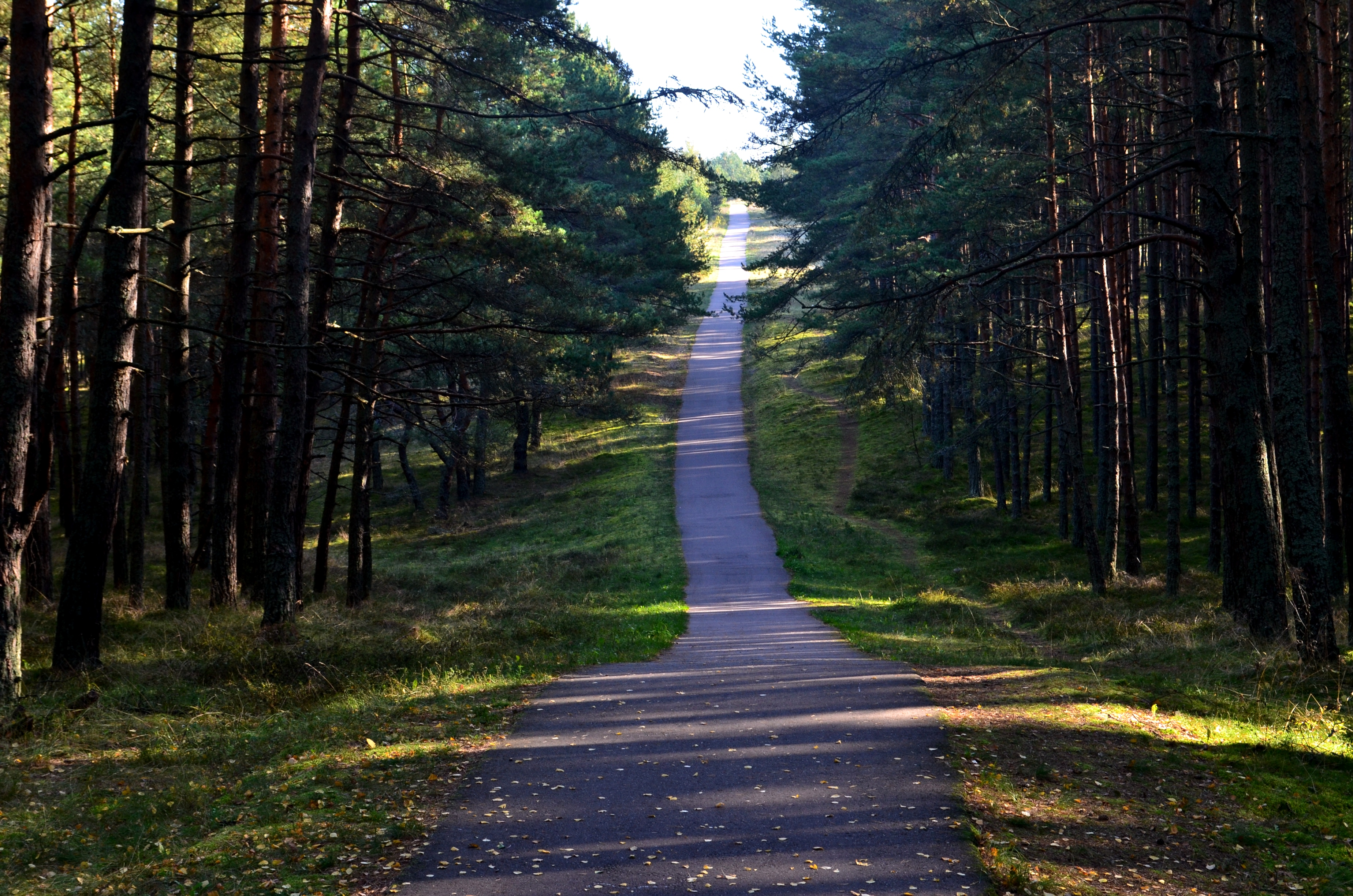 Hageno kalnas nuo jūros, Smiltynė, Klaipėda